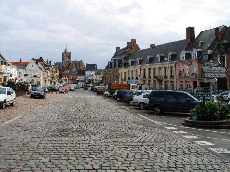 Markt te Kassel (Frankrijk) - eigen foto